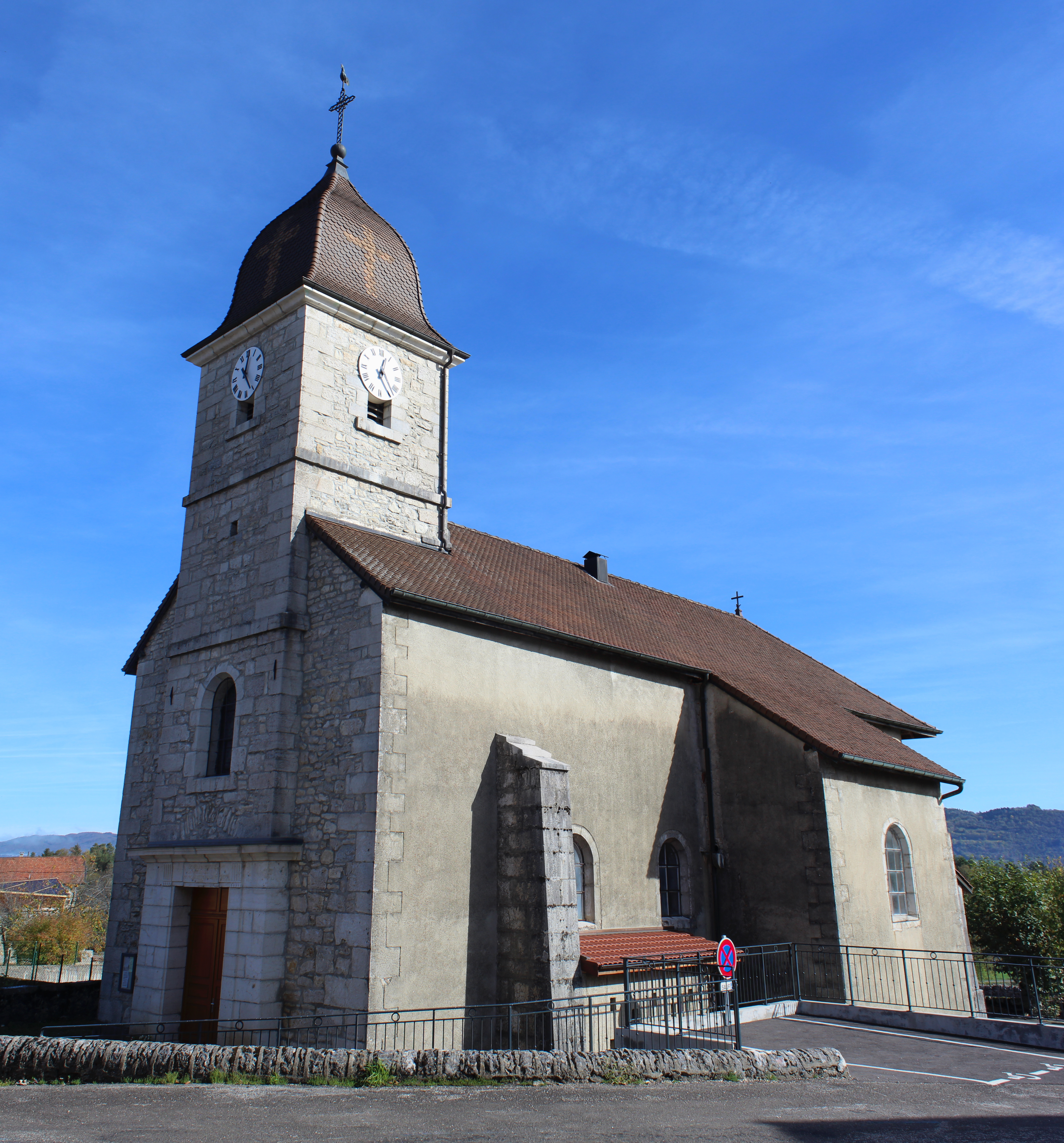 Église de l'Assomption-de-la-Bienheureuse-Vierge-Marie de Vosbles.